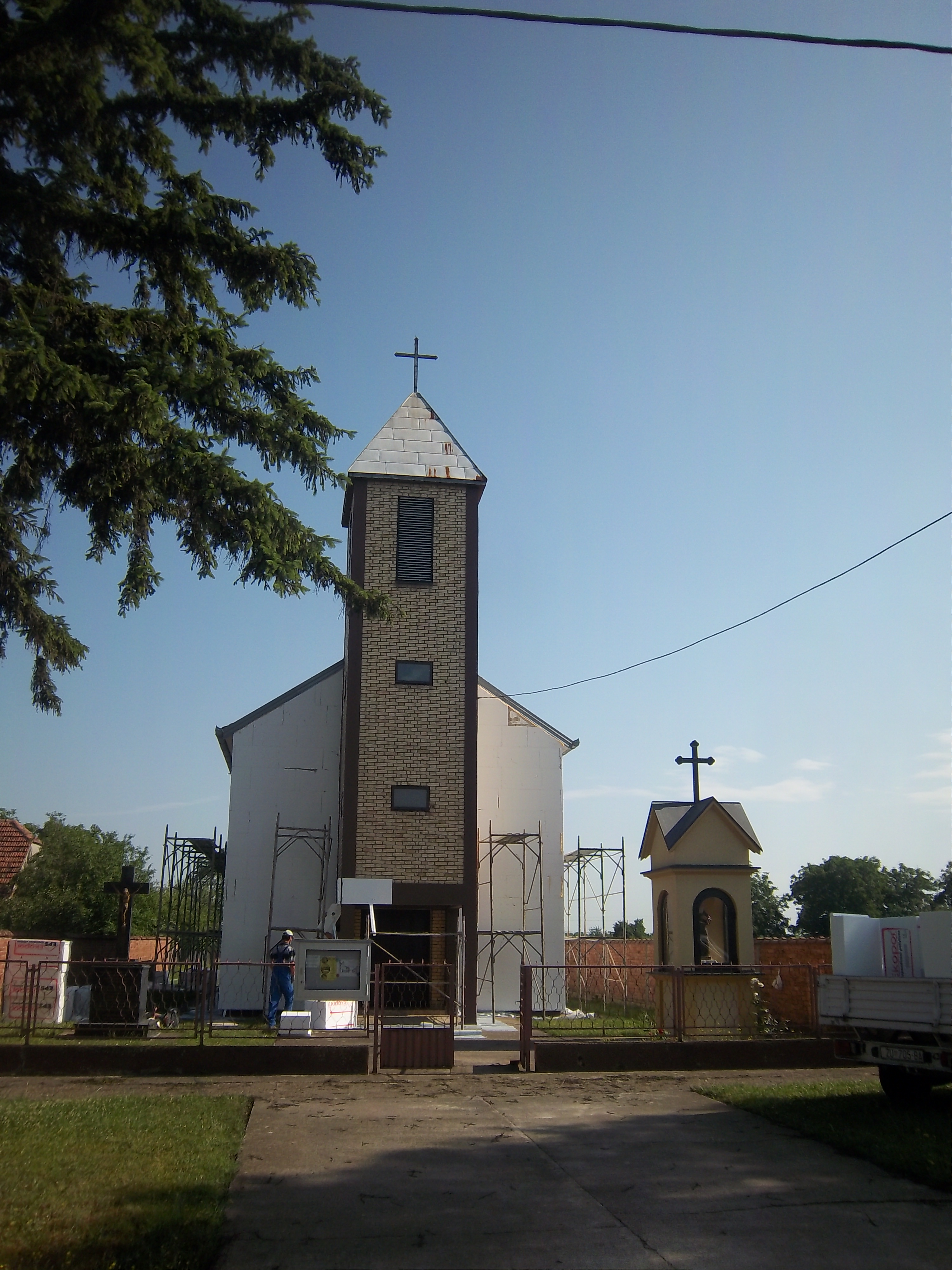 Srpskohrvatski / српскохрватски: Naselje Bokšić u Općini Tompojevci u Vukovarsko-srijemskoj županiji (Republika Hrvatska).